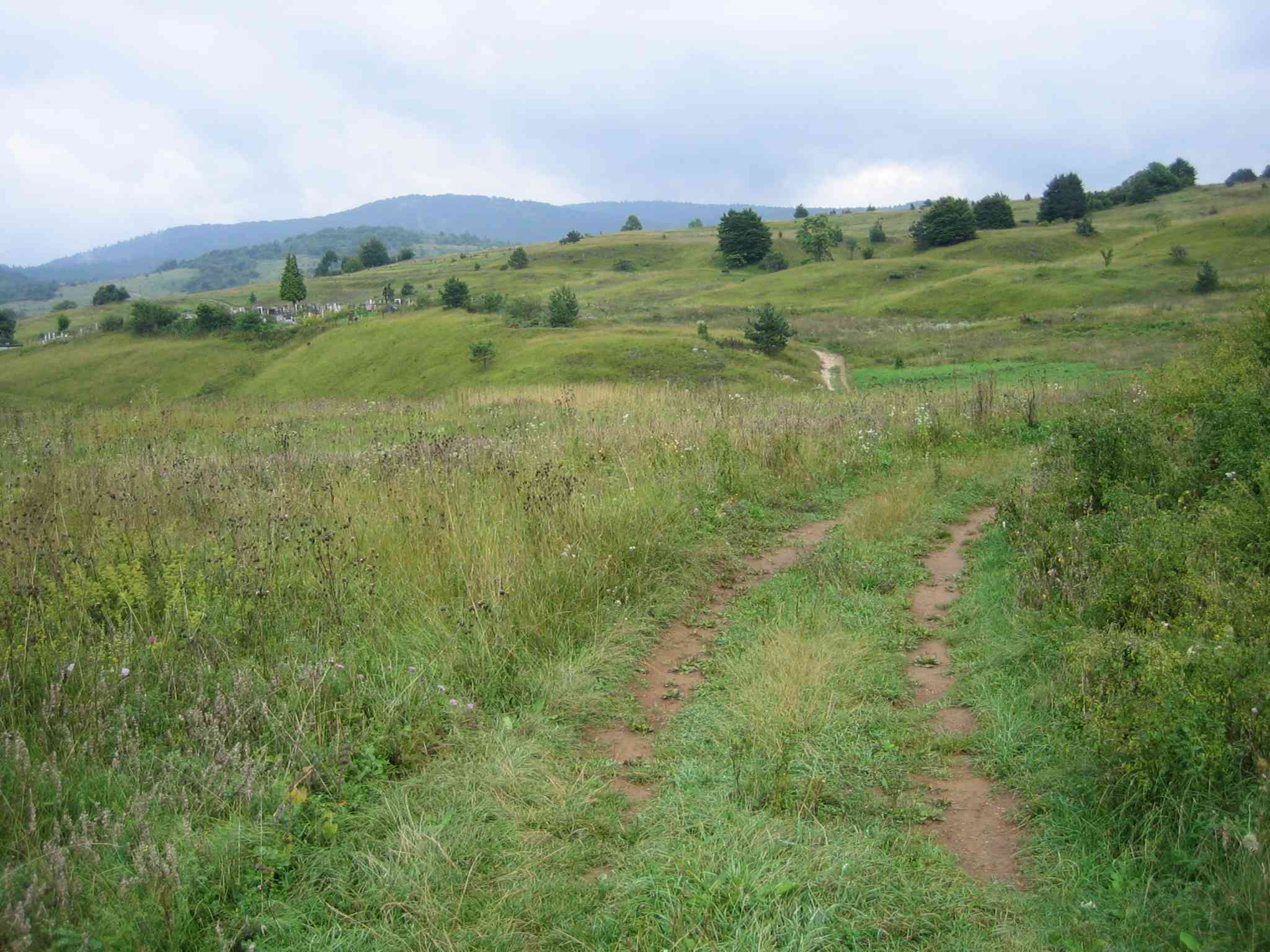 Krater in der Karstlandschaft der Lika, Kroatien.